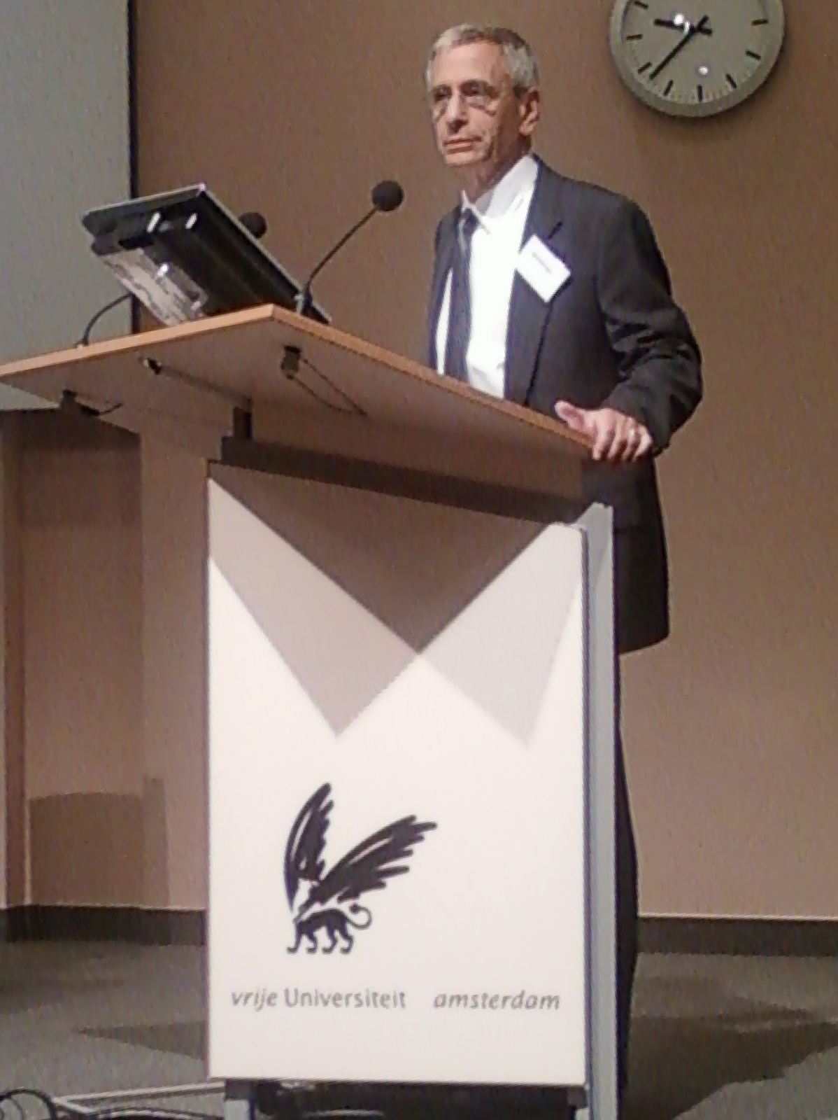 Mark Braverman (1948) is klinisch psycholoog en een joods filosoof (Ph.D) die zich op het terrein van de theologie beweegt. Mark Braverman spreekt op de Conferentie 'Uur der Waarheid', over het Palestijnse Kairosdocument. Gehouden 15 en 16 sept. 2011 op de Vrije Universiteit te Amsterdam, Nederland